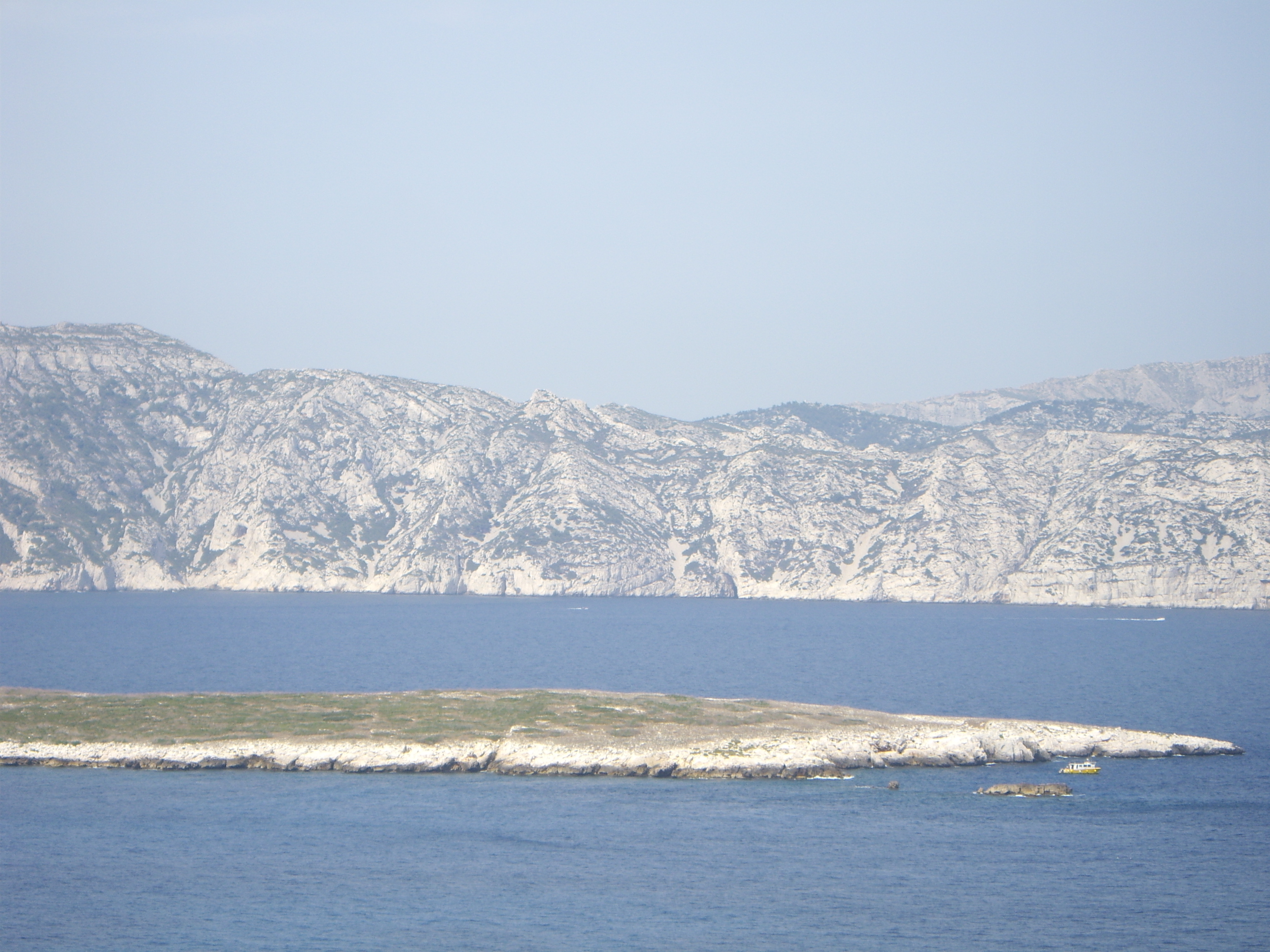 Île Calseraigne, France. (vue depuis l'île de Riou)